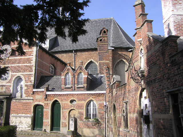 The Beguinage of Antwerpen , provincie Antwerpen , Belgium.beguinage